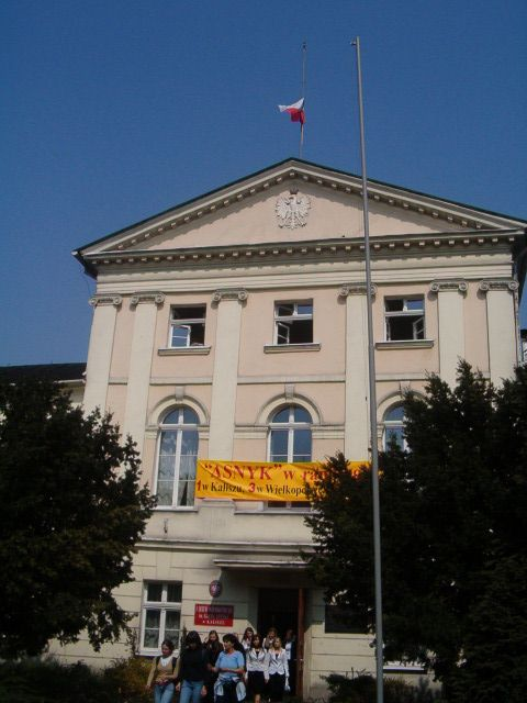 Kalisz, ul. Grodzka 1 - dawna szkoła wojewódzka z 1819 r (obecnie I Liceum Ogólnokształcące im. Adama Asnyka (zabytek nr rejestr. 31/A)